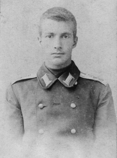 Сергей Владимирович Шереметев во время службы во флоте.